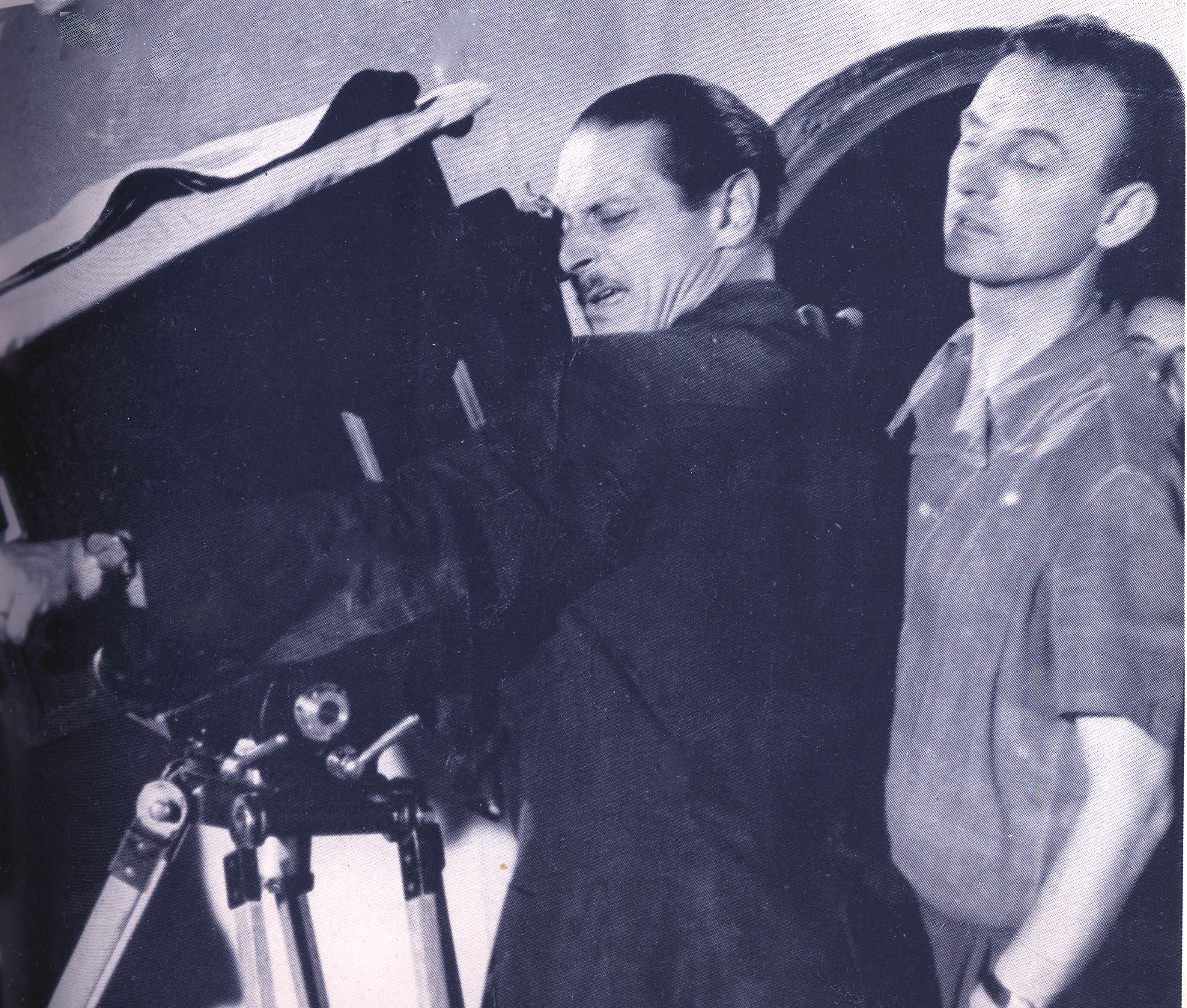 Alessandro Blasetti e Vaclav Vich